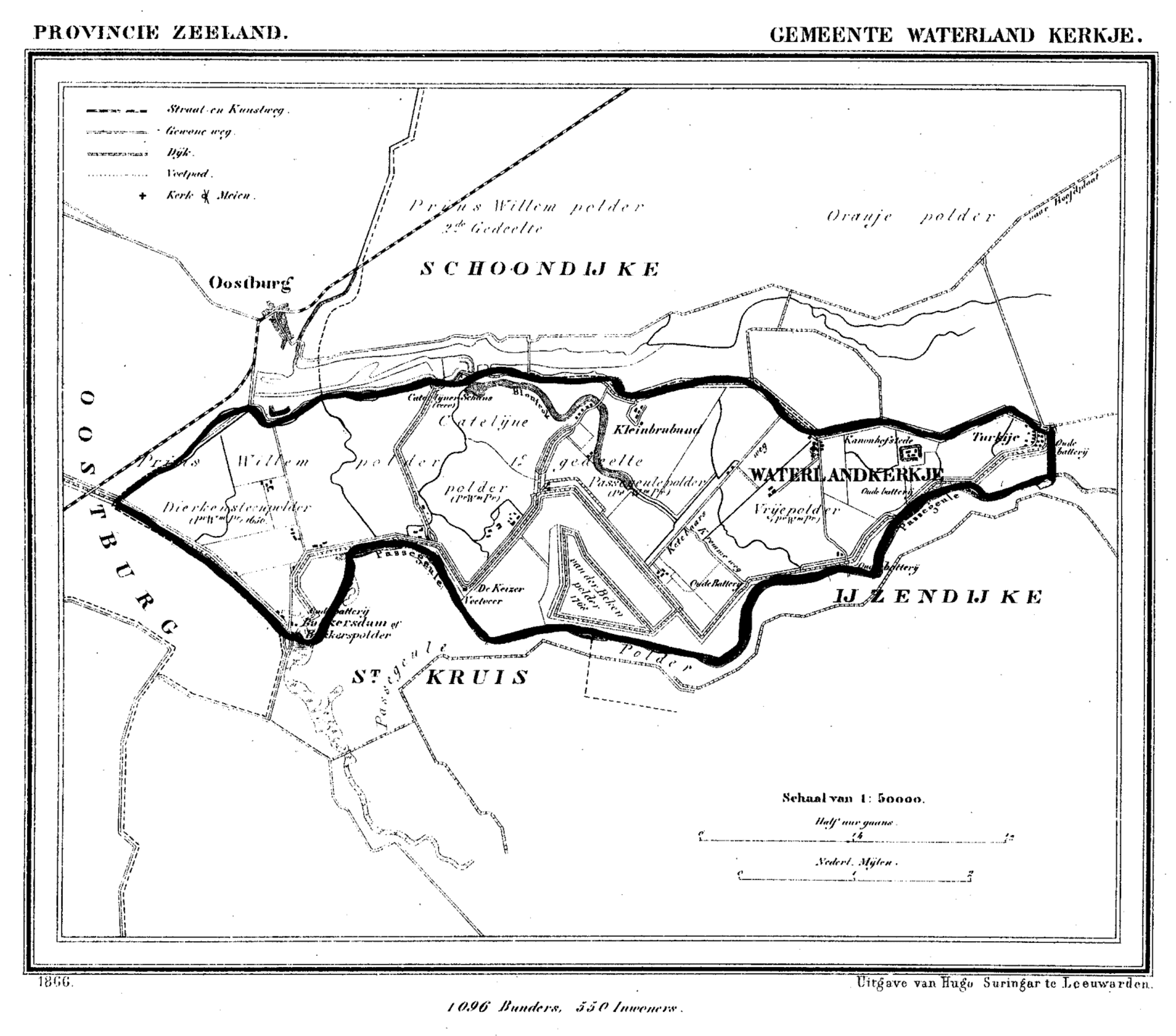 Gemeente Waterlandkerkje, Zeeland, Nederland